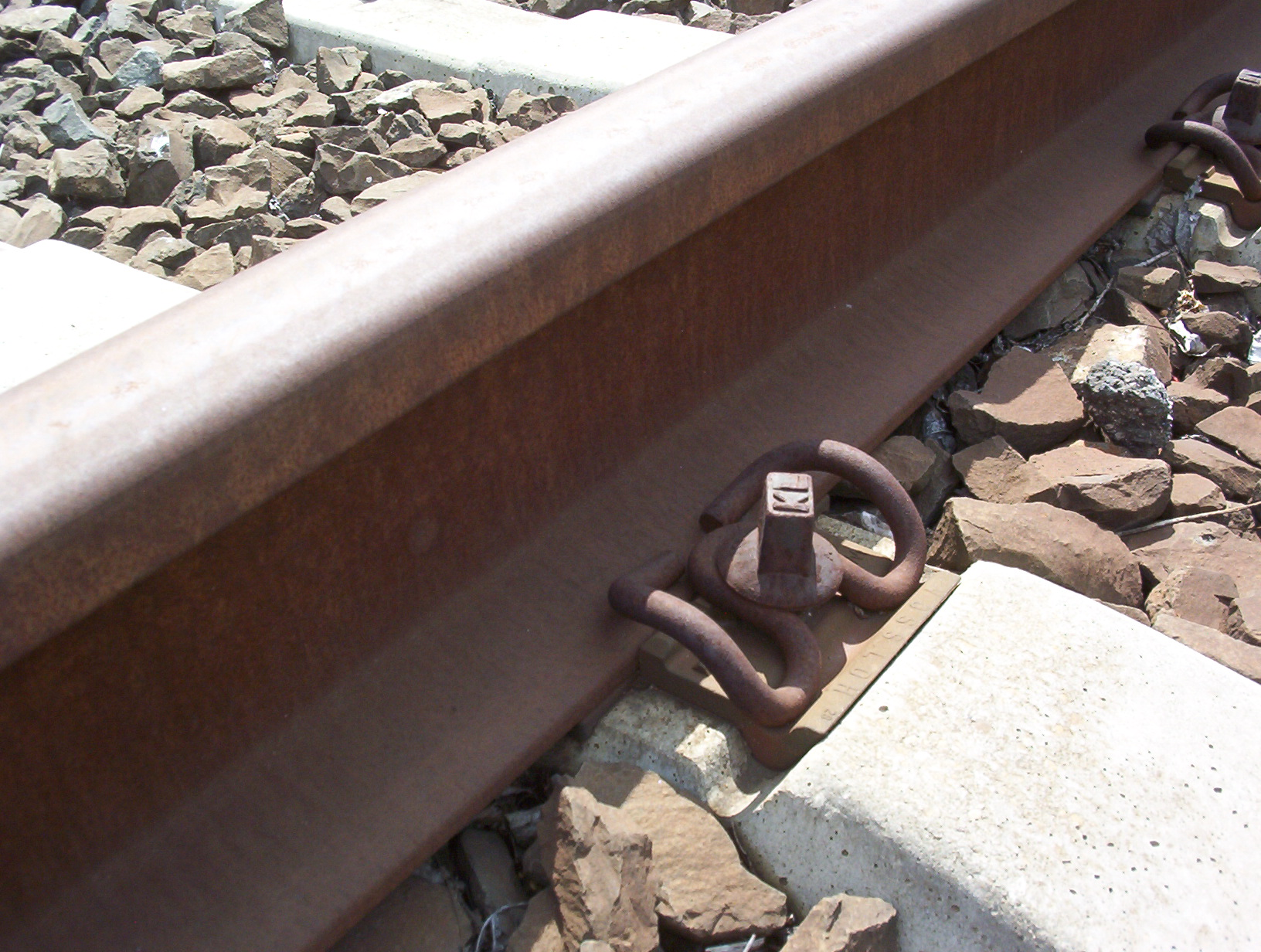 LW vasbetonaljon SKL-14 rendszerű sínleerősítés (Budapest, Soroksári út)